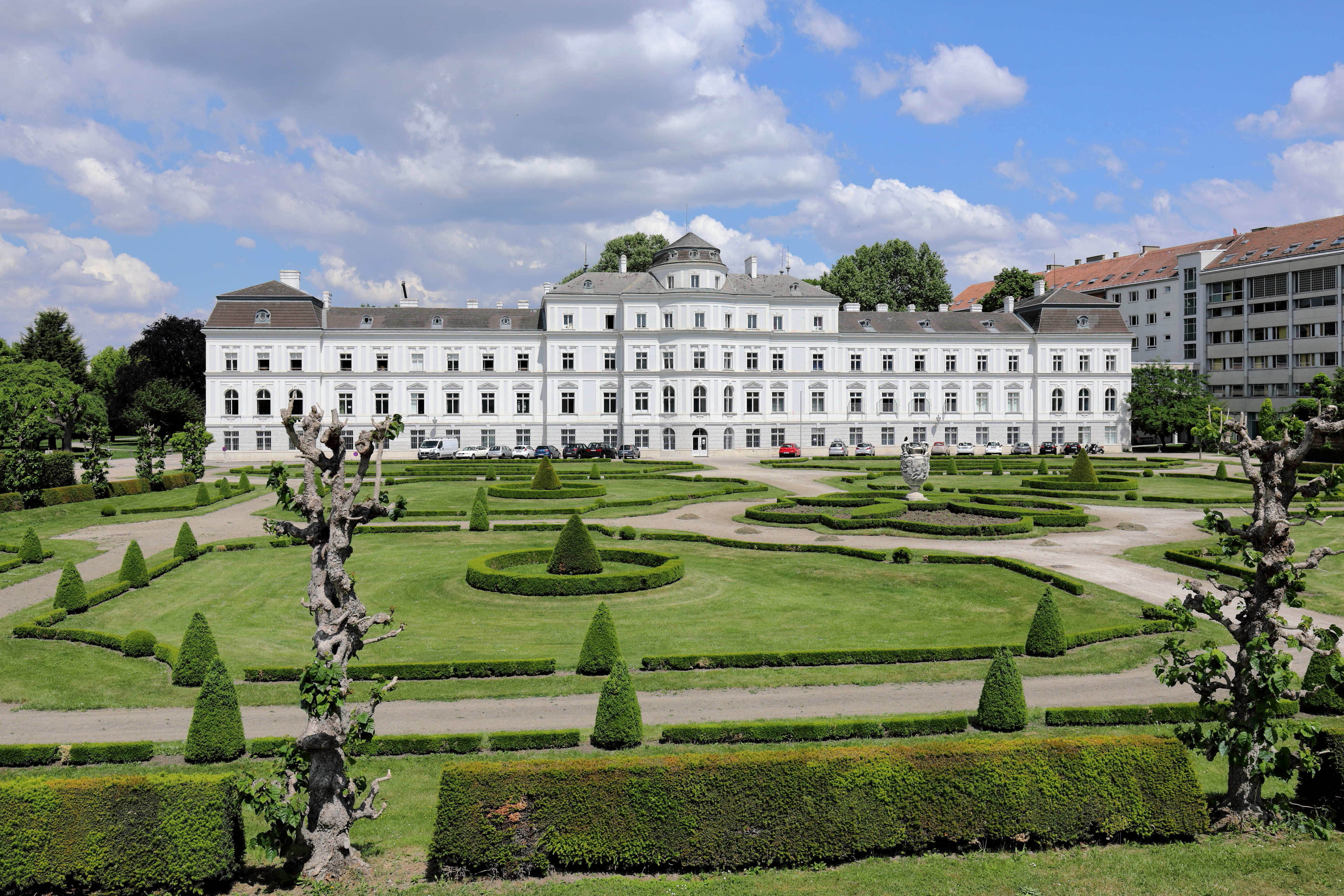 Das Palais Augarten im 2. Wiener Gemeindebezirk Leopoldstadt. Das Palais wurde ursprünglich Ende des 17. Jahrhunderts als Gartenpalais durch Johann Bernhard Fischer von Erlach für den Ratsherrn Zacharias Leeb errichtet. 1897 wurde das Palais aufgestockt sowie vergrößert und von Erzherzog Otto mit Gattin Maria Josefa und den Söhnen Max und Karl (ab 1916 Kaiser Karl I.) bewohnt. 1948 bezogen die Wiener Sängerknaben das nach Kriegsschäden wiederinstandgesetzte Palais als neues Heim.